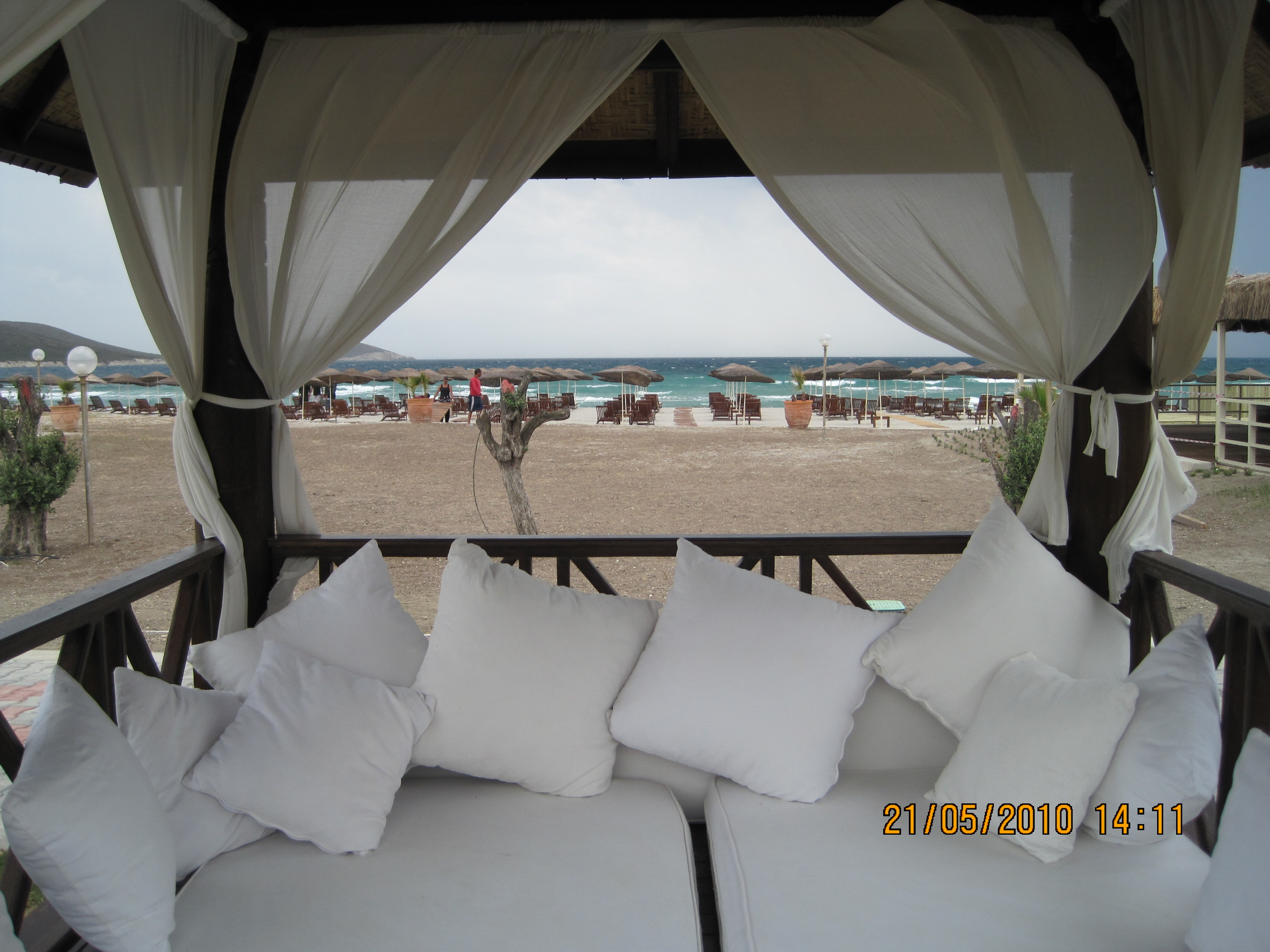 35930 Alaçatı Belediyesi/Çeşme/İzmir, Turkey